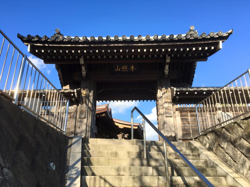 蓮法寺(横浜市)の山門